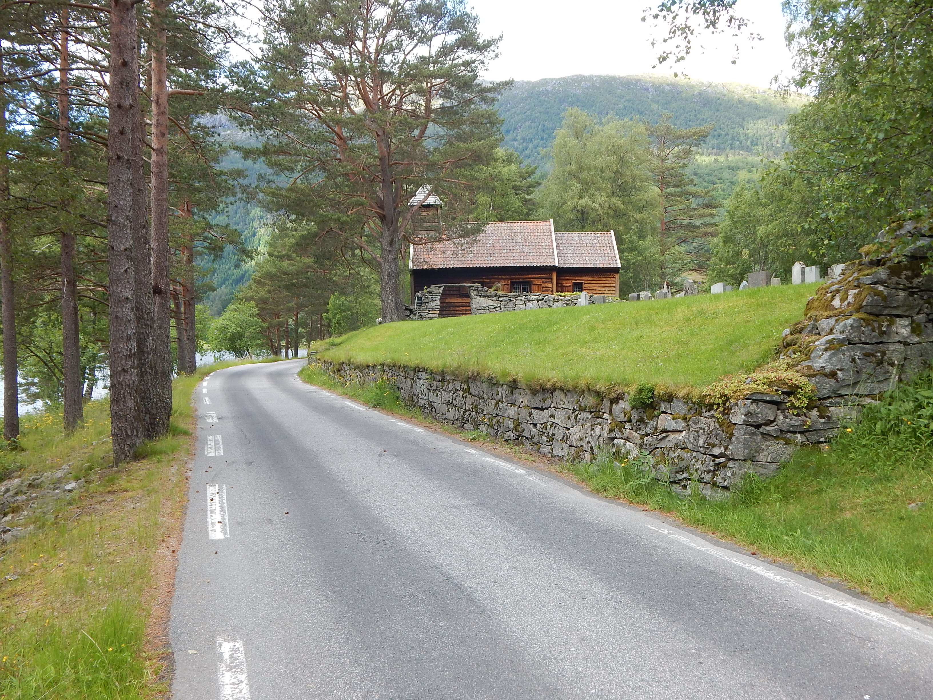 Fylkesvei 610 forbi Hestad kapell